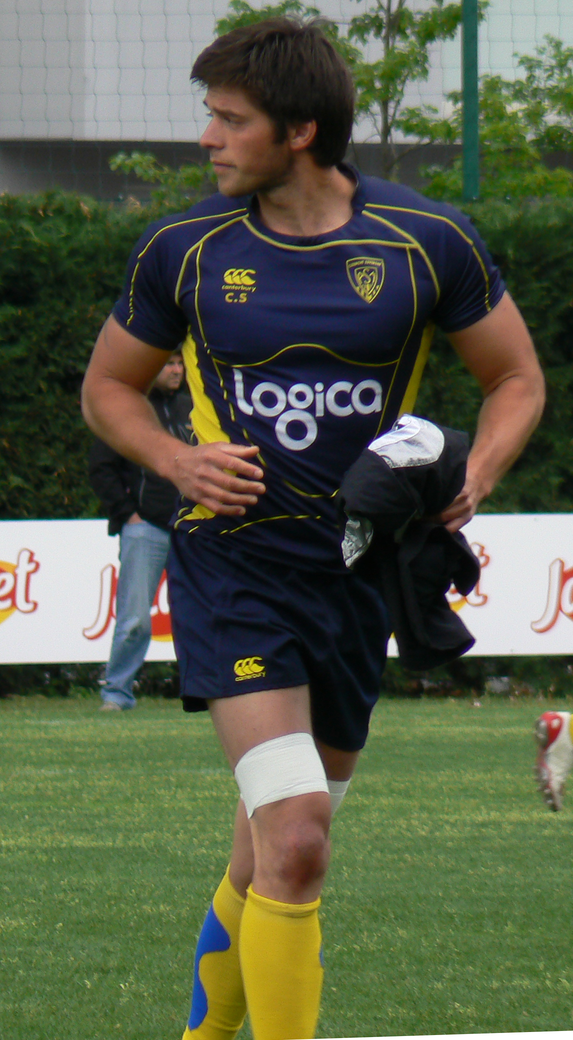 Le rugbyman français CHristophe Samson avec l'ASM Clermont Auvergne